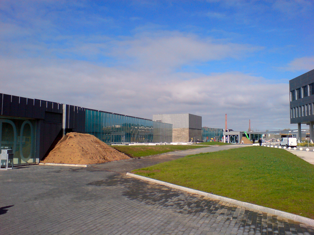 Hospital de León.